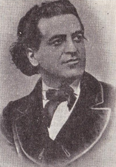 Istoria Teatrului in Romania, Editura Academiei, 1973